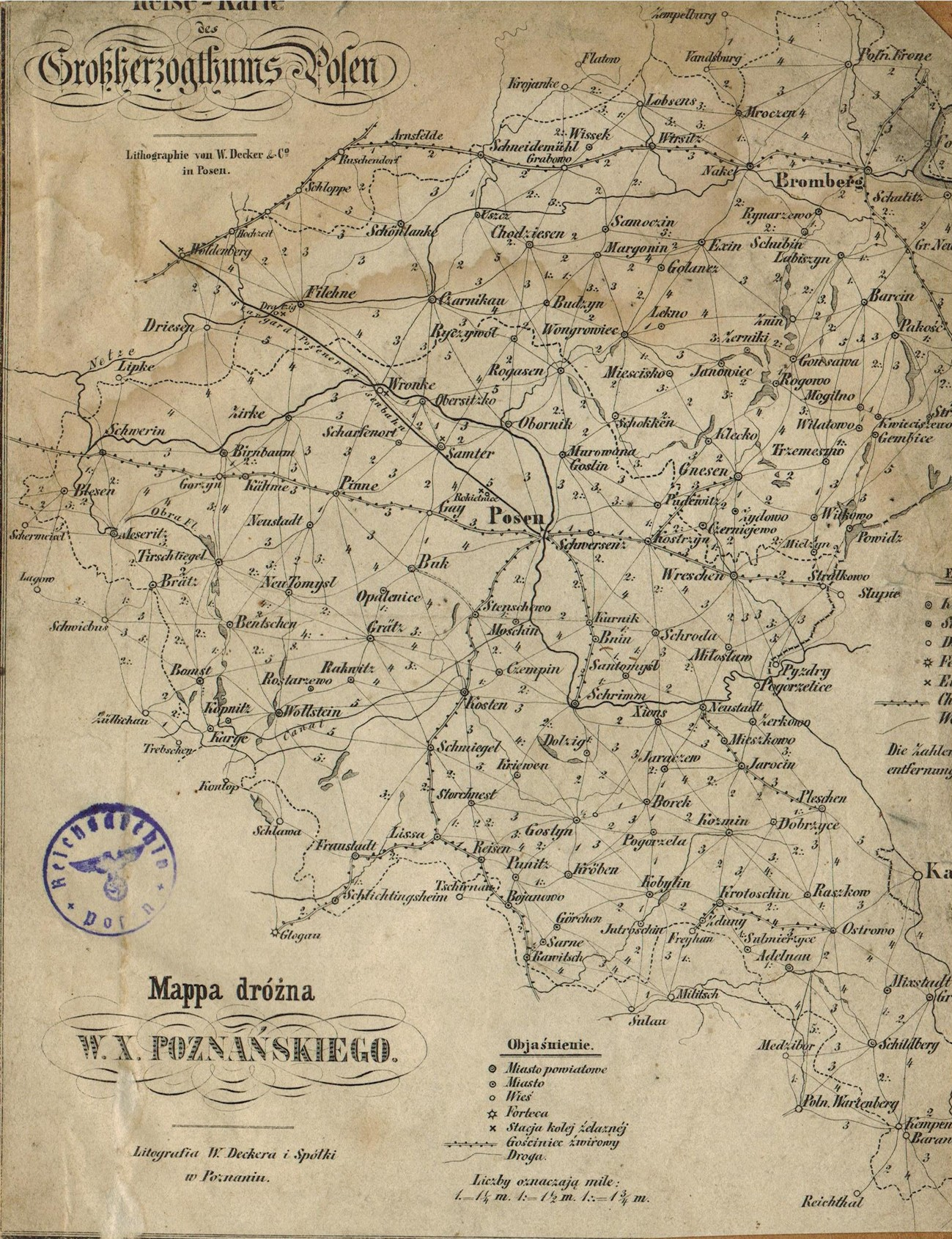 Reise - Karte des Grossherzogthums Posen